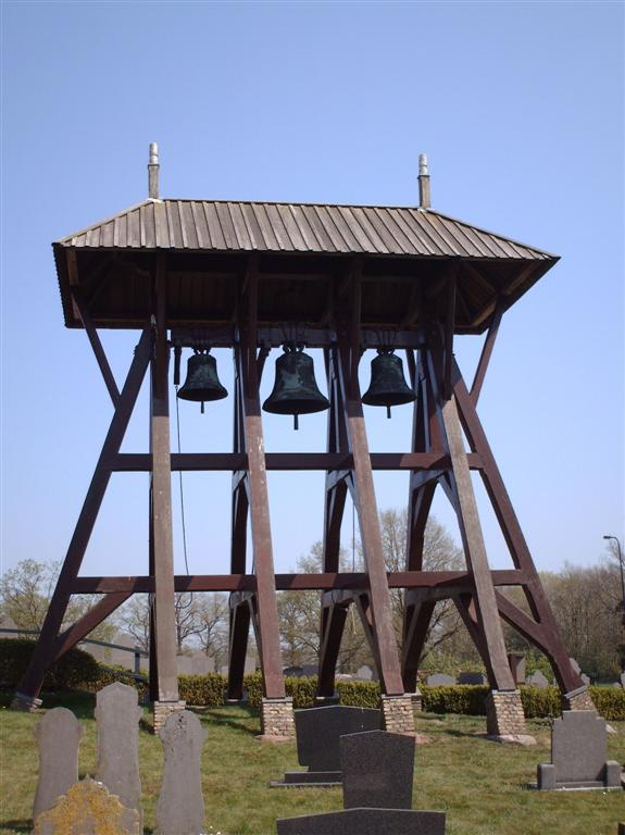 Klokkenstoel in Wijnjewoude